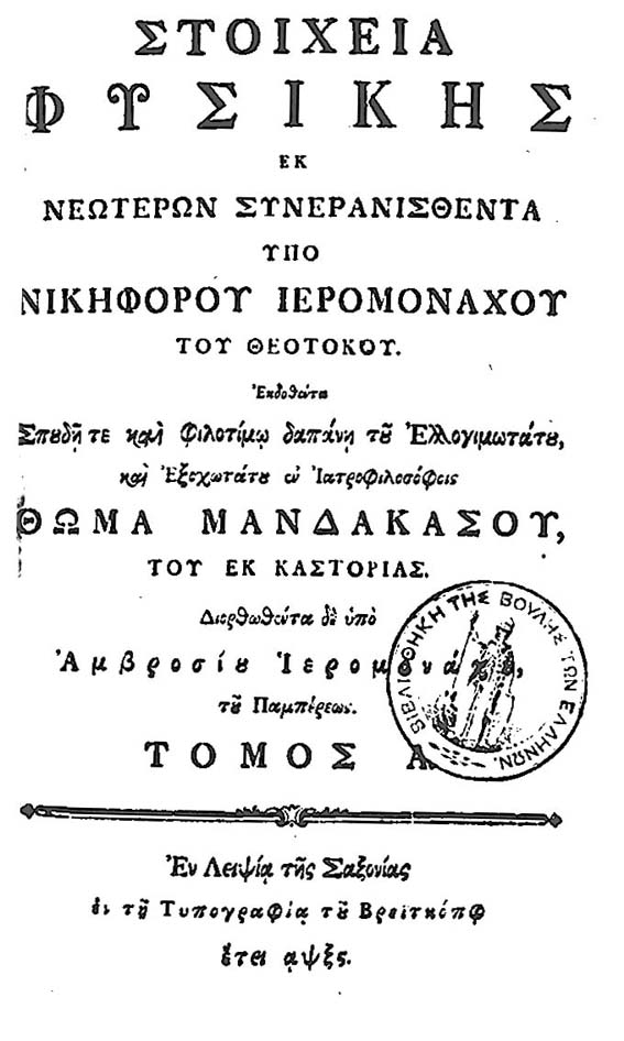 Εσώφυλλον, από το βιβλίο Στοιχεία Φυσικής του Ν. Θεοτόκη (1731/1736-1805)